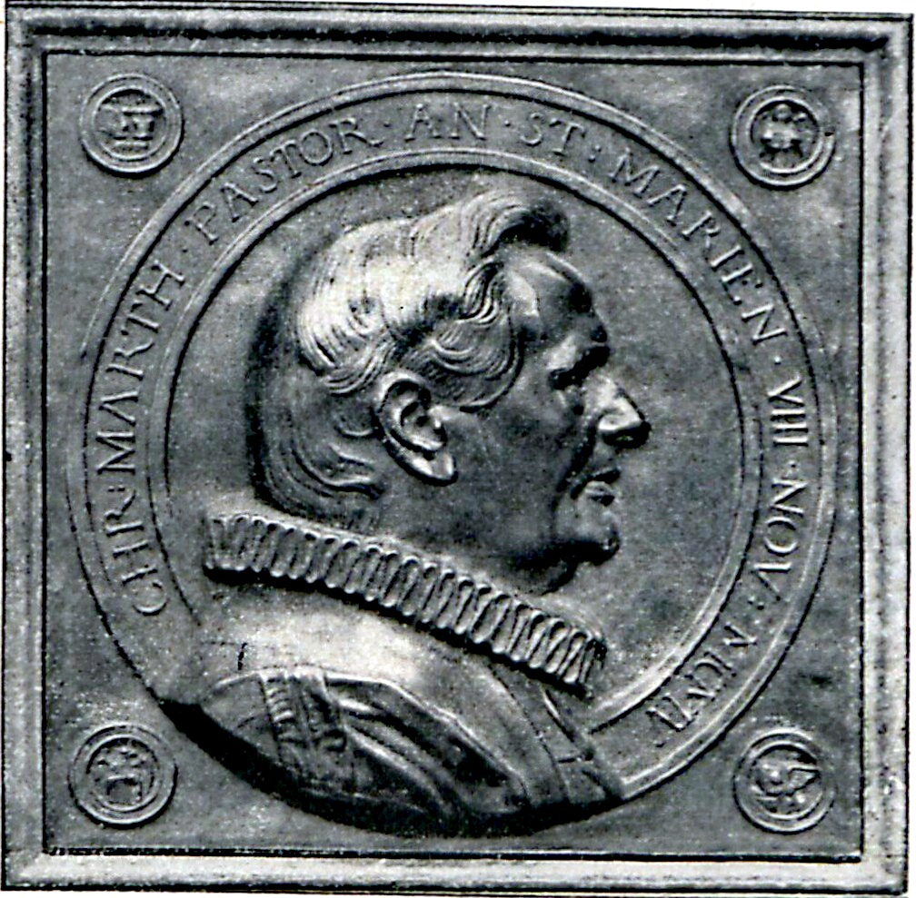 Plakette mit dem Bildnisse Hauptpastor Marths in der St. Marienkirche zu Lübeck, gestiftet aus Anlass des 25jähr. Amtsjubiläums im März 1908